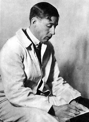 Yngve Berg